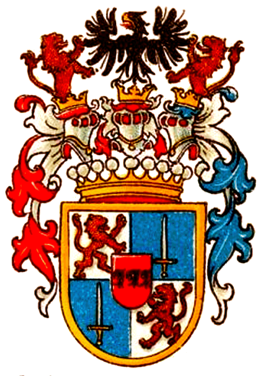 Wappen der Grafen von Klinckowstroem